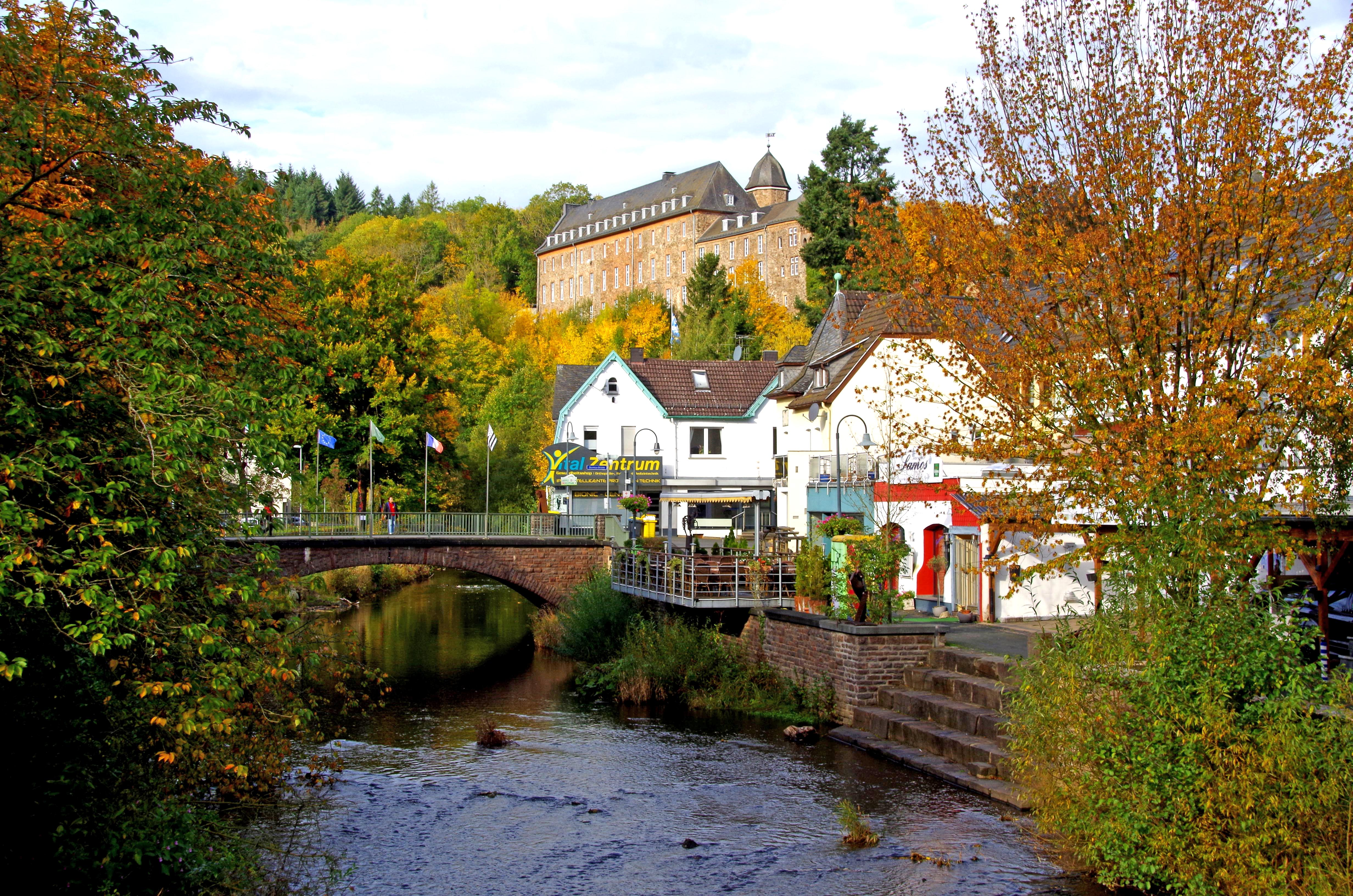 Schleiden, Brückenblick auf Olef und Schloss